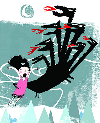 Raamatu "Lilla kuningatütar" illustratsioon